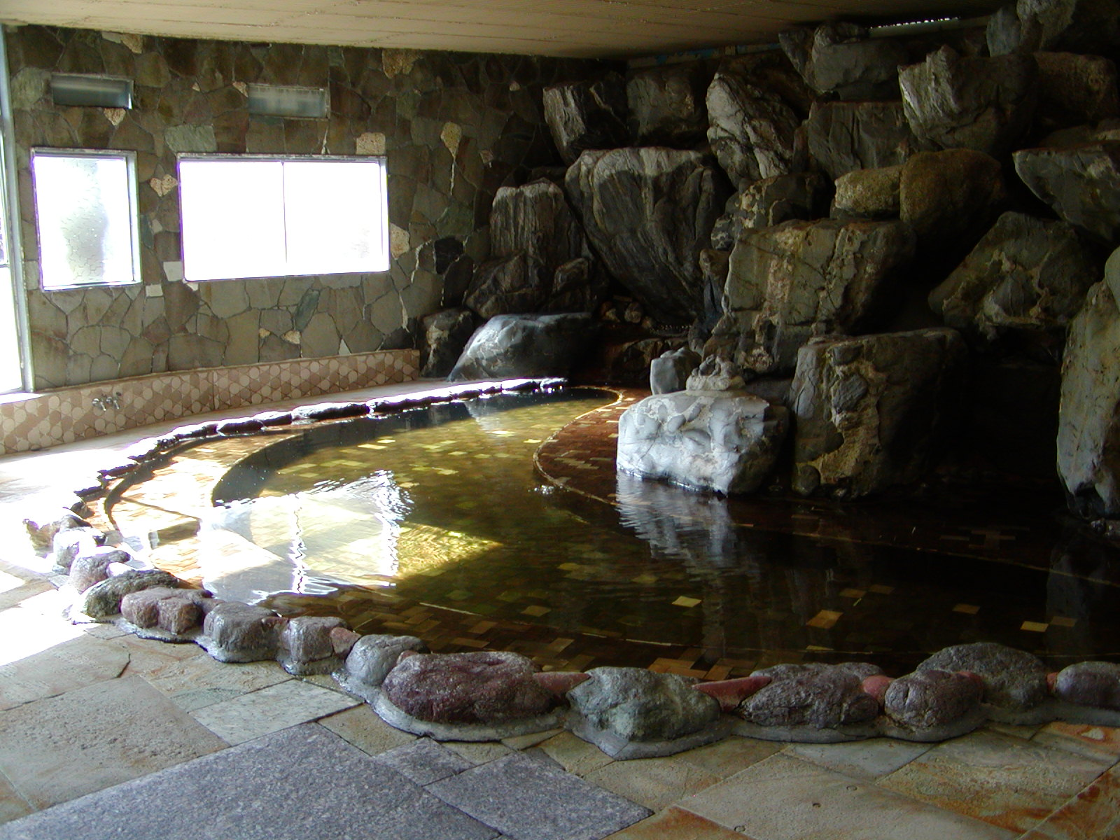 添沢温泉 山の家 大浴場（愛知県設楽町）